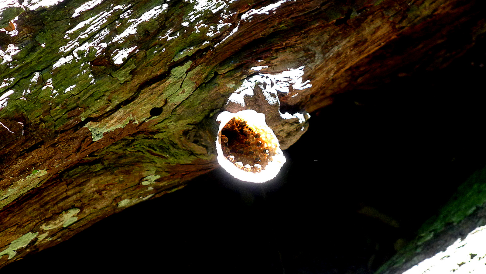 Scaptotrigona aff. postica